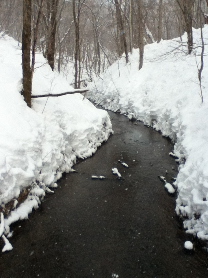 内別川上流部、源頭部から東向き